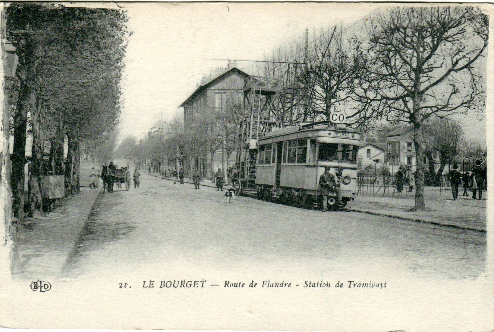 Carte postale ancienne éditée par ELD N° 11 LE BOURGET : Route de Flandre - Station de Tramways Ligne "CO" des TPDS après 1913 (prolongement de la ligne à l'Opéra)